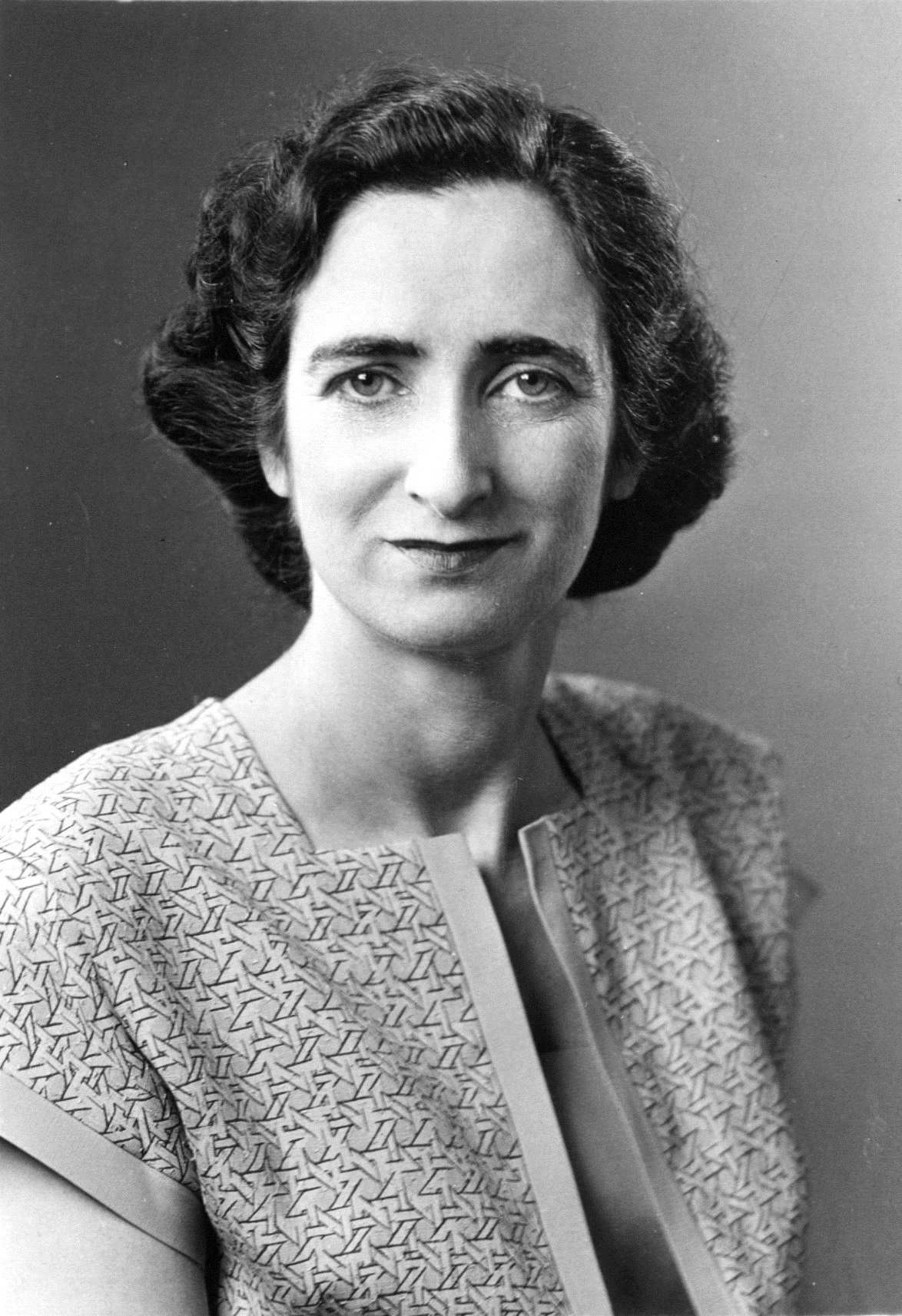 Pièce illustrant Alice Girard.